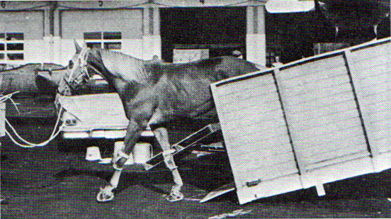 タカマガハラ